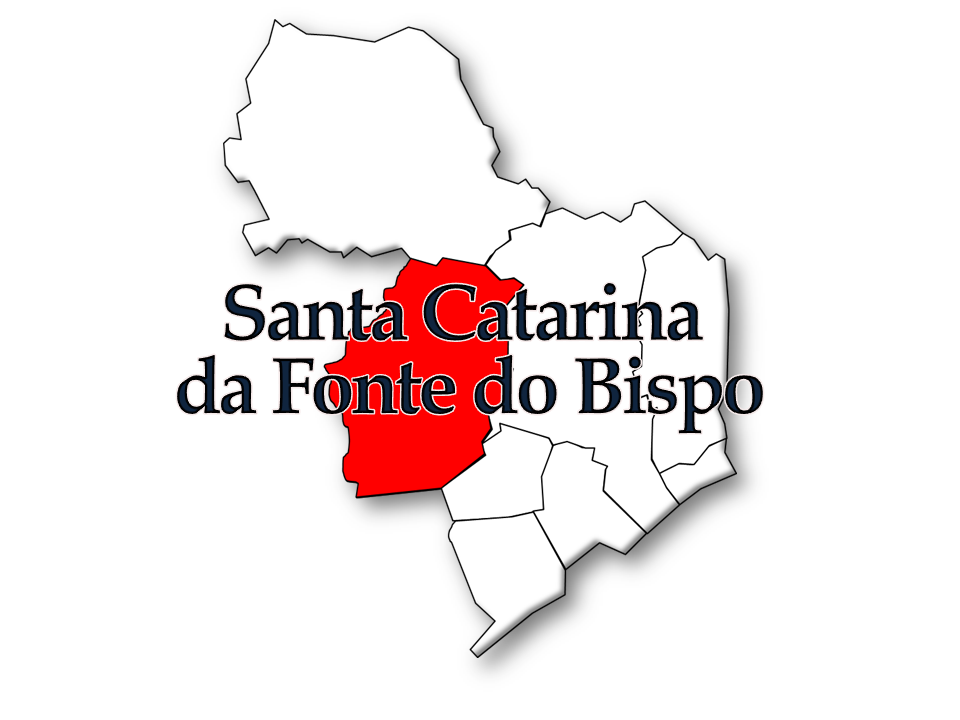 Censos 1864/2011